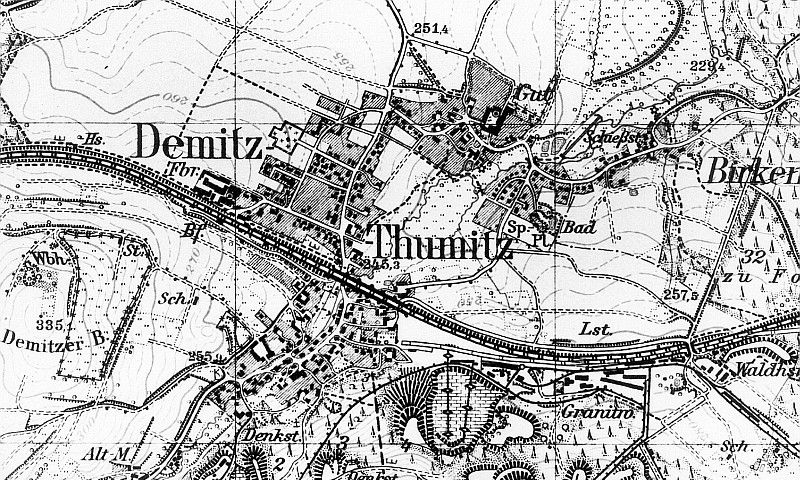 Original image description from the Deutsche Fotothek Demitz-Thumitz-Demitz. Meßtischblatt, 1:25.000, Sekt. Bischofswerda, Nr. 4851 (RA Görlitz 30/38)